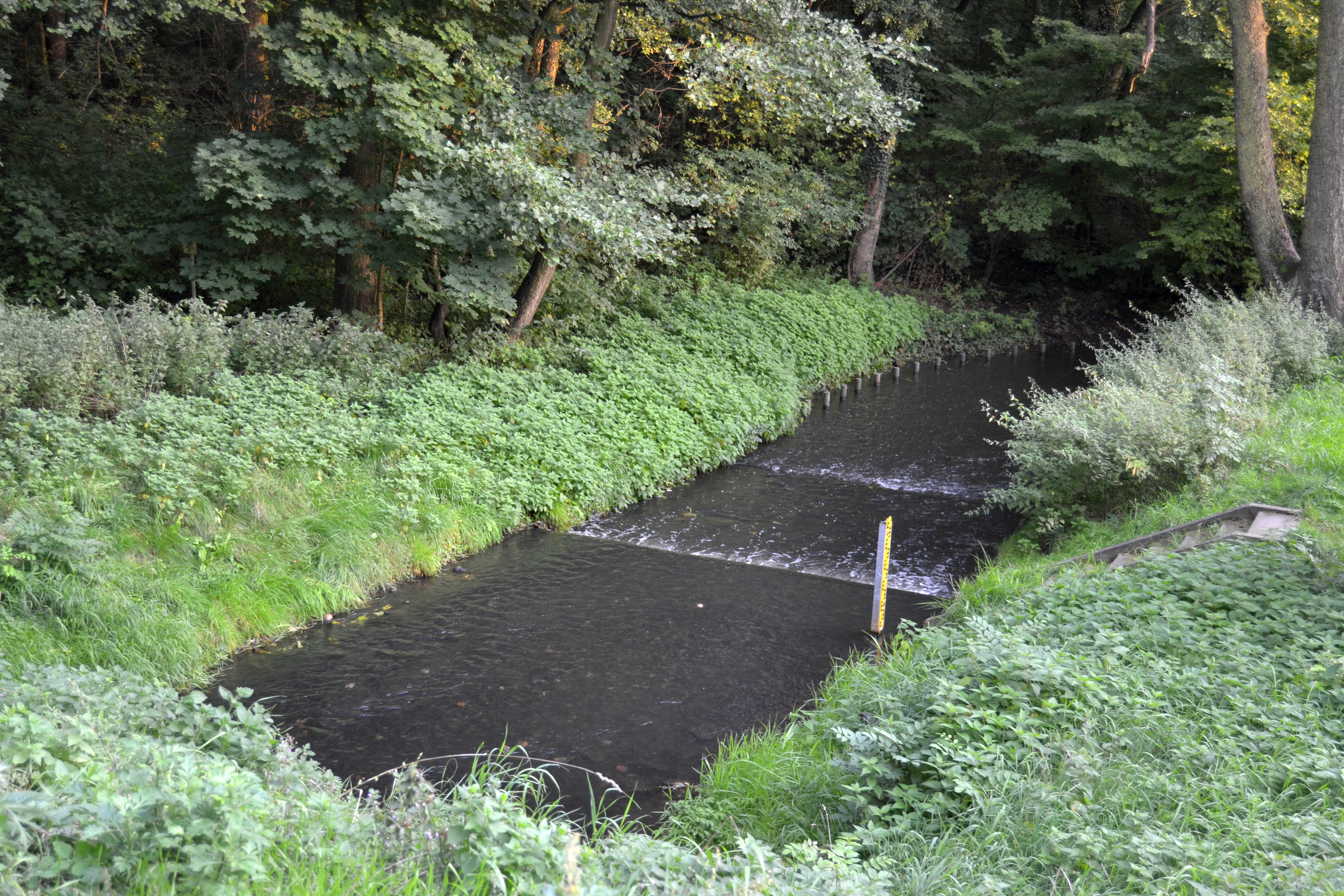 Neuenhagener Mühlenfließ auf Höhe der Alten Berliner Straße in Hoppegarten; Abschnitt im LSG „Niederungssystem des Neuenhagener Mühlenfließes und seiner Vorfluter“.